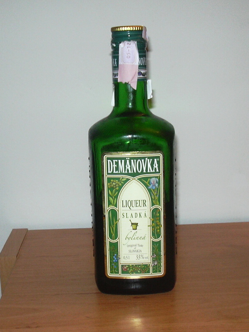 Demänovka (Liker- slovakia)